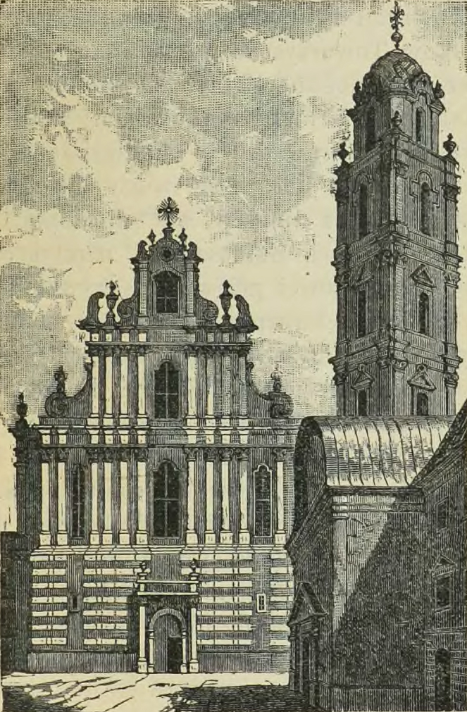 Беларуская (тарашкевіца): Вільня (Vilnia), Вялікі Двор (Vialiki Dvor) Віленскага ўнівэрсытэту. Касьцёл Сьвятых Янаў